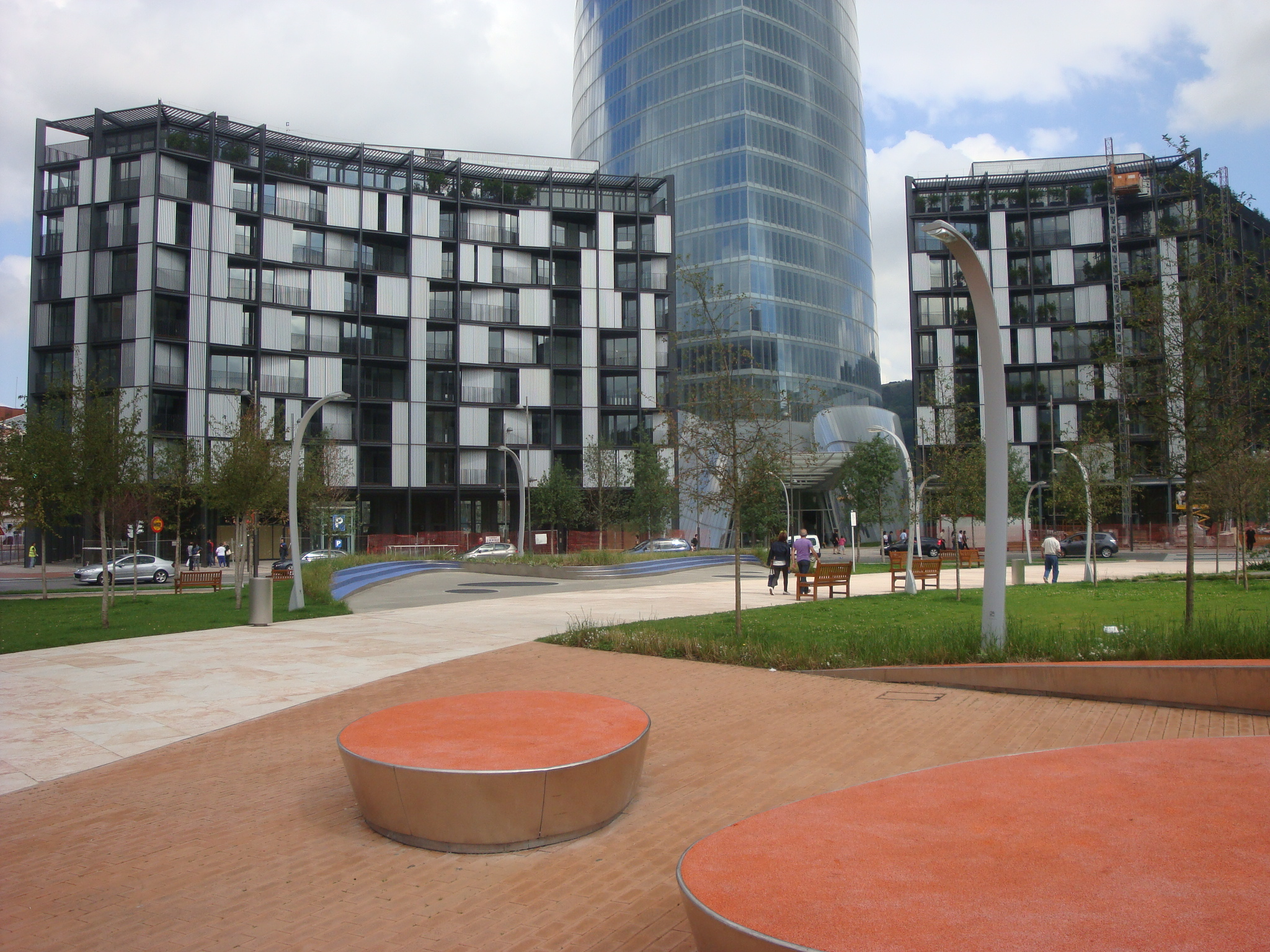 Bilbao